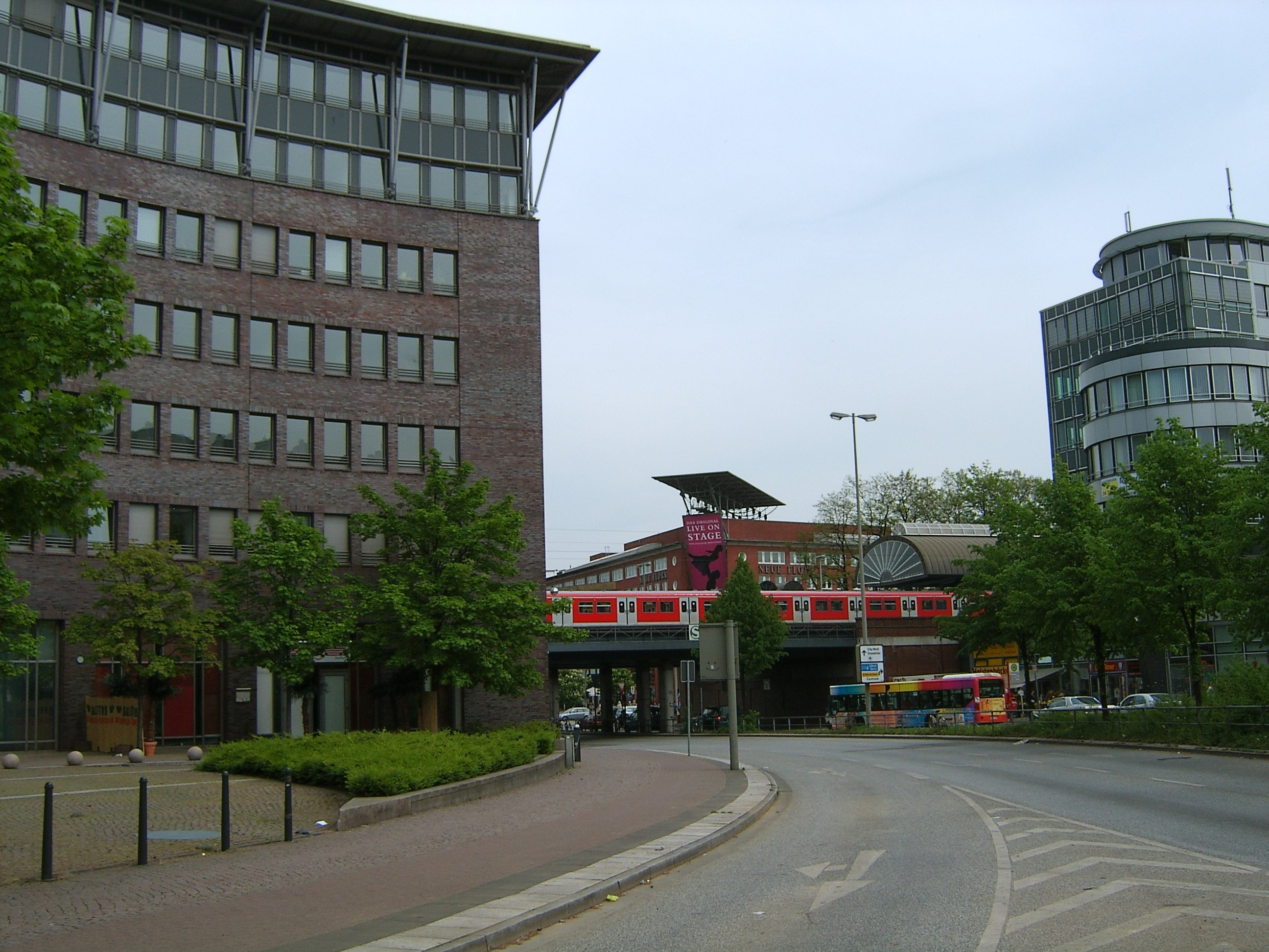 Verwaltung der Holstenbrauerei (links), S-Bahnhof Holstenstraße (Mitte) und Neue Flora (dahinter) in Altona-Nord.